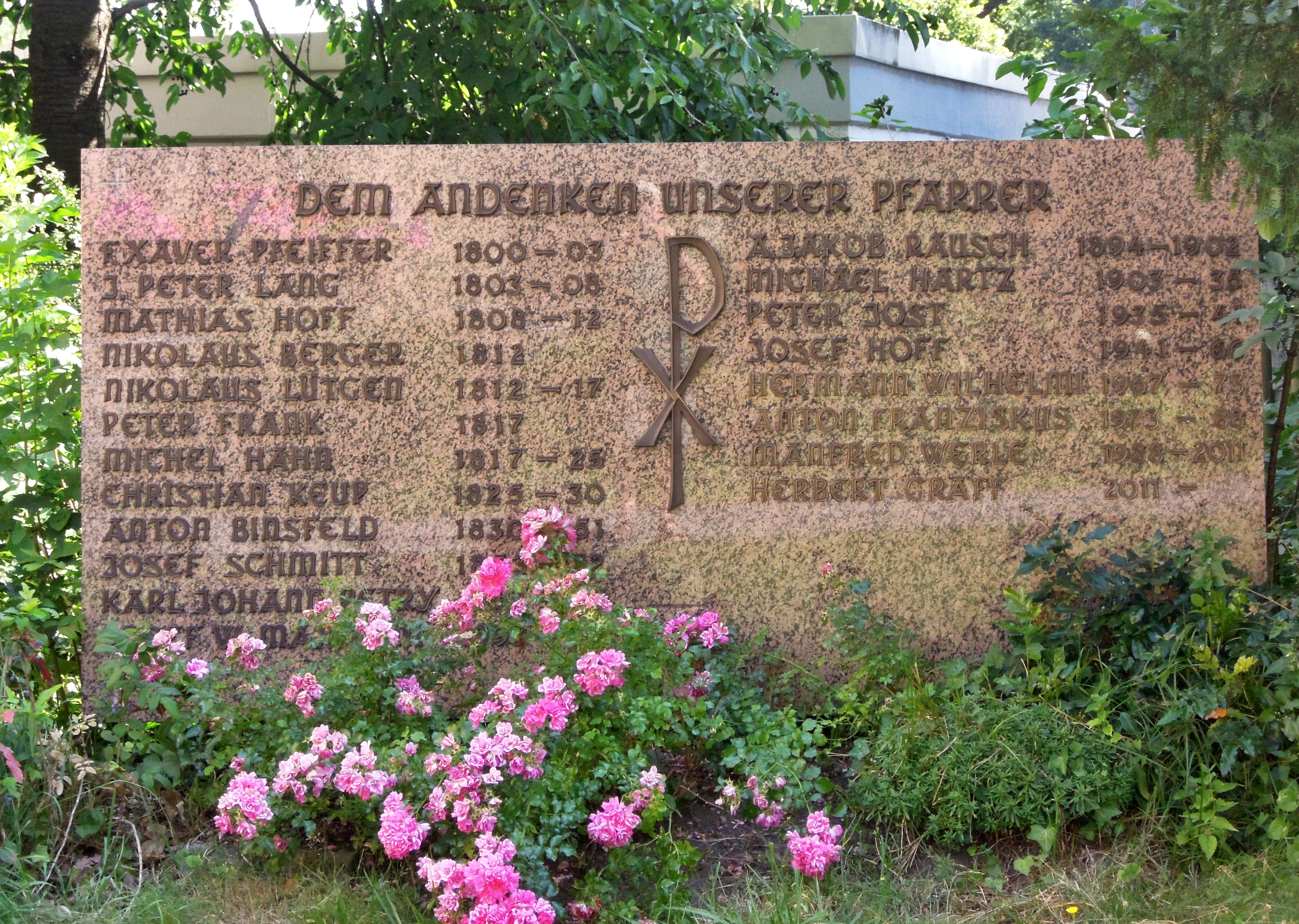 Pfarrer der Kirche in Wallerfangen.